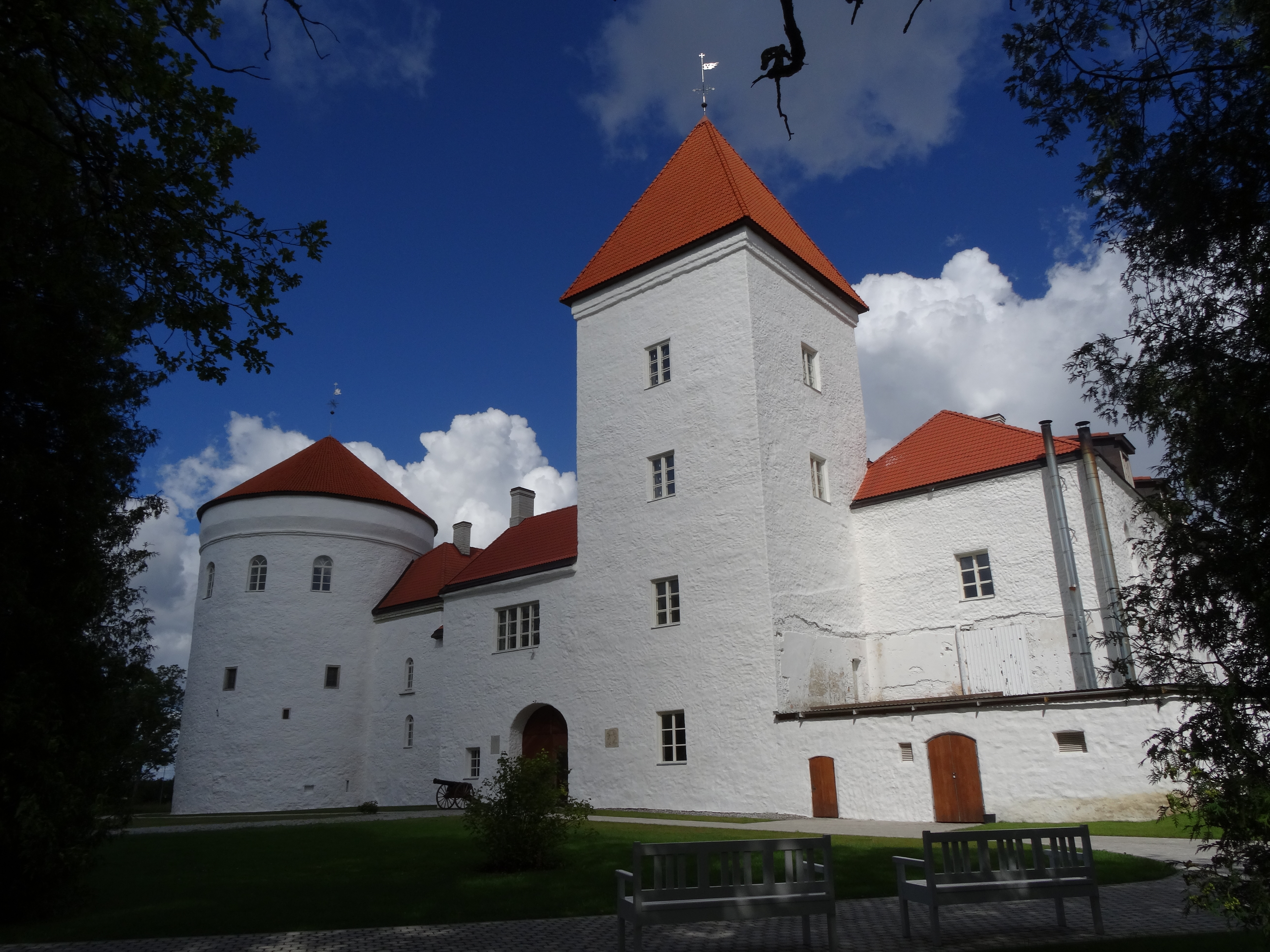 Koluvere linnus (September 2015, eest)